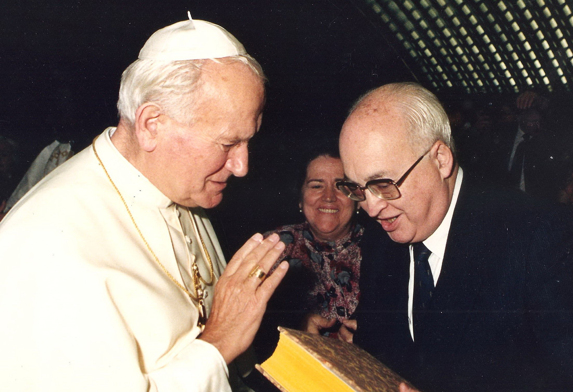 Francisco Canals Vidal entrega un volumen de Cristiandad a San Juan Pablo II en la Ciudad del Vaticano en 1989.